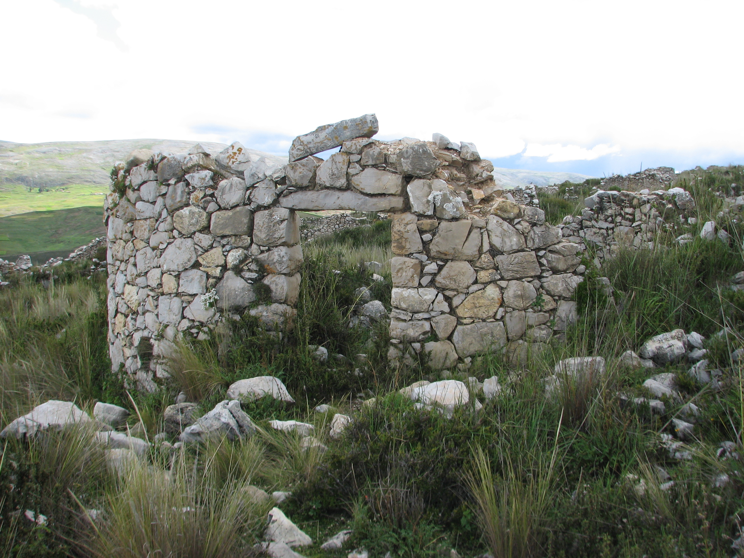 Tunanmarca Archaeological site (storehouse)